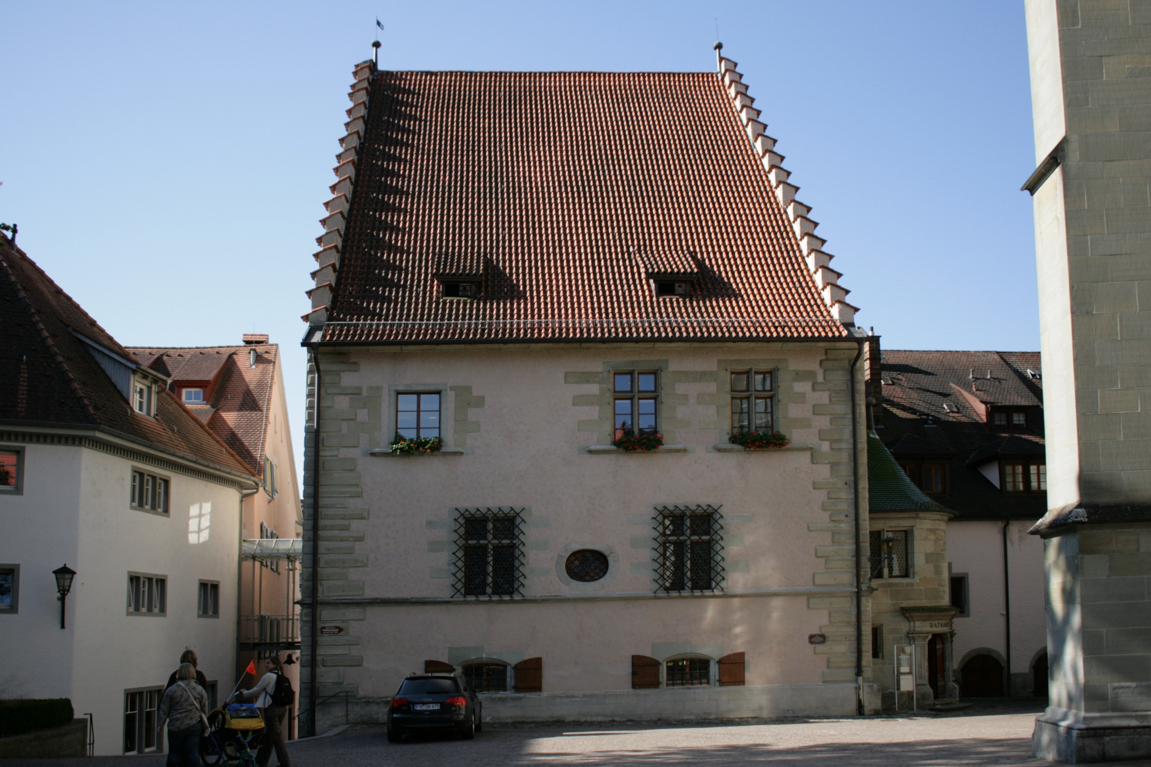 Rathaus an der Pfennigturmgasse in Überlingen